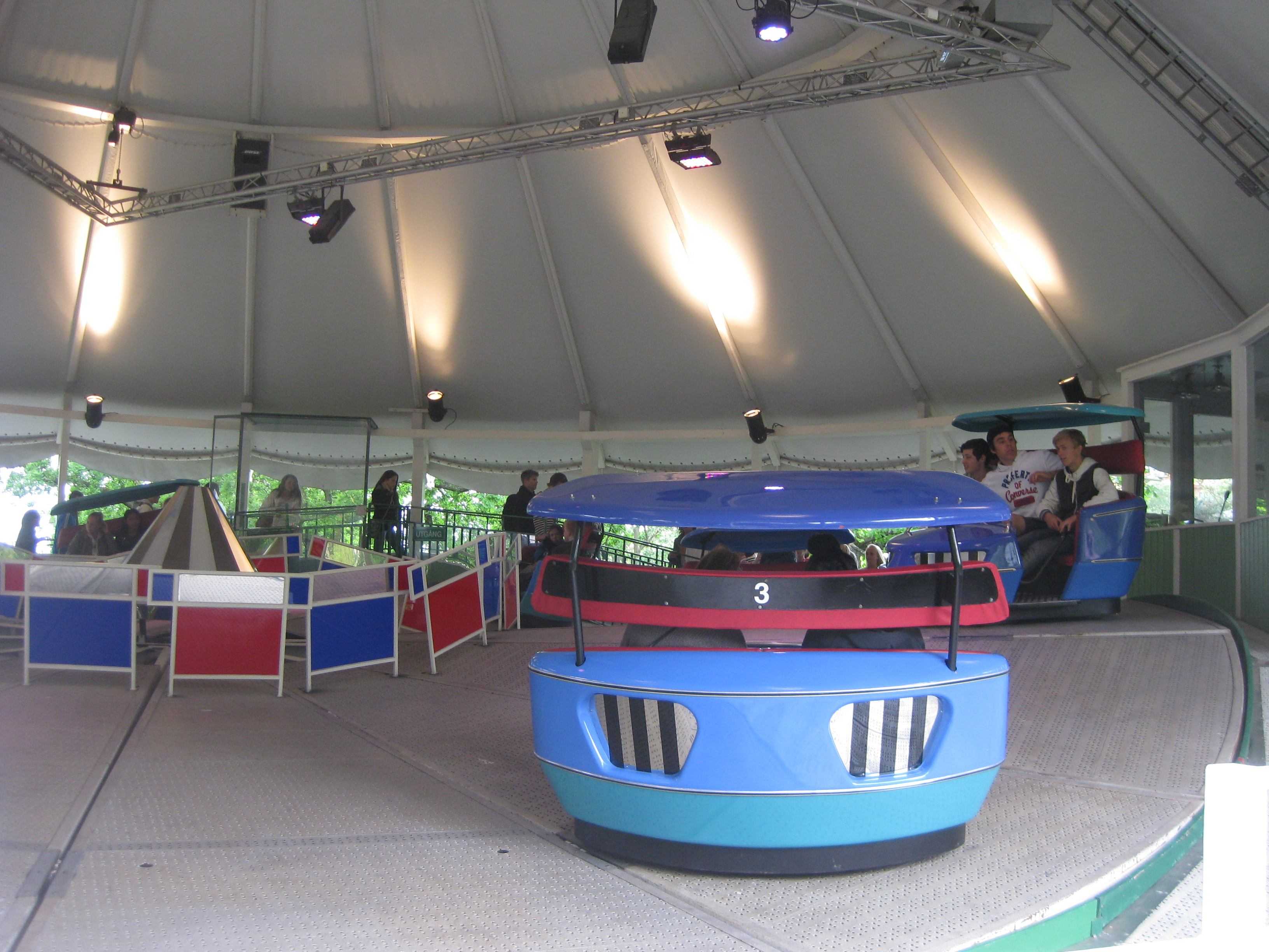 Virvelvinden i juni 2012.